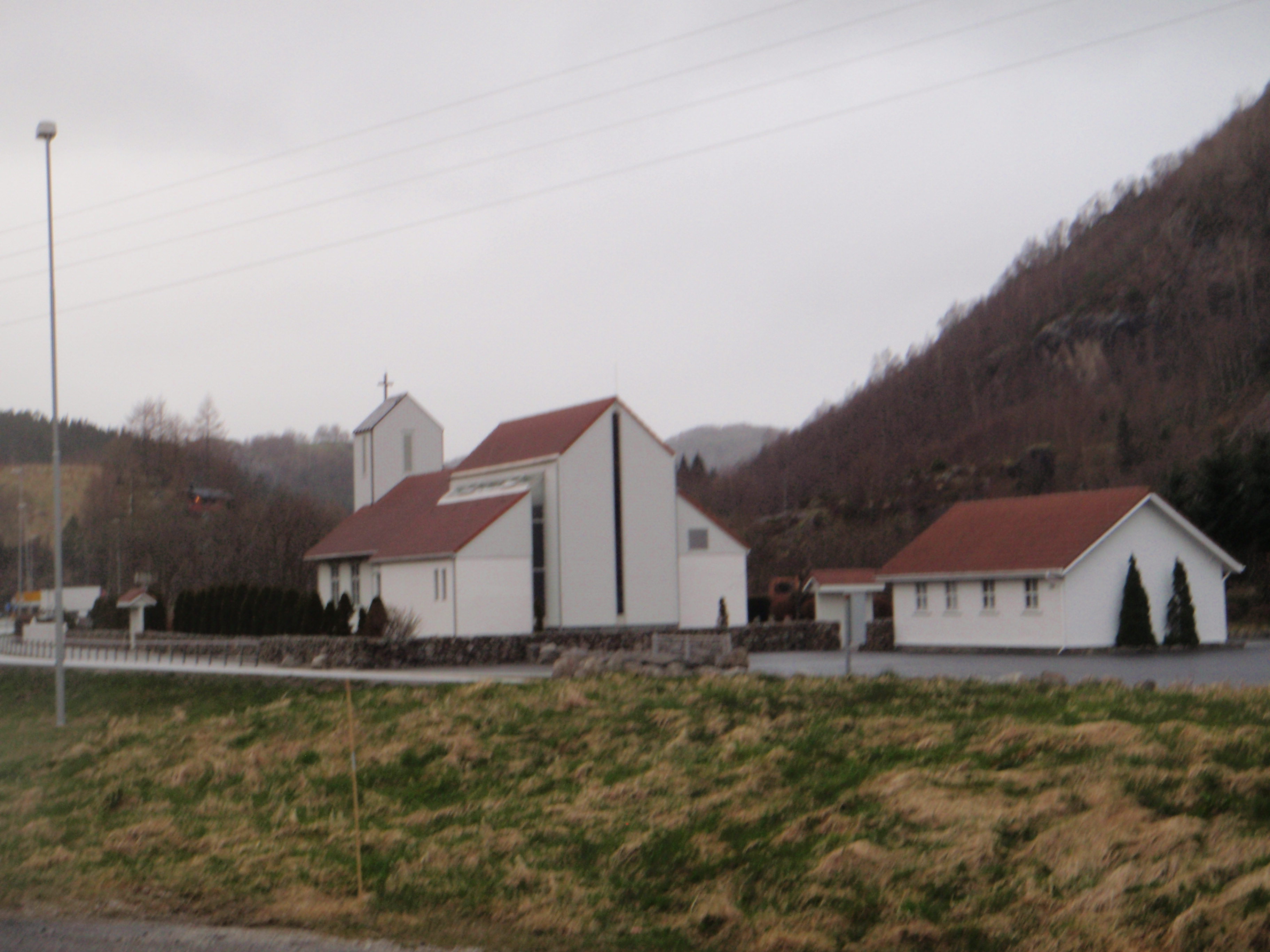 Den såkalte Perekjerka beliggende på Helleland, Rogaland